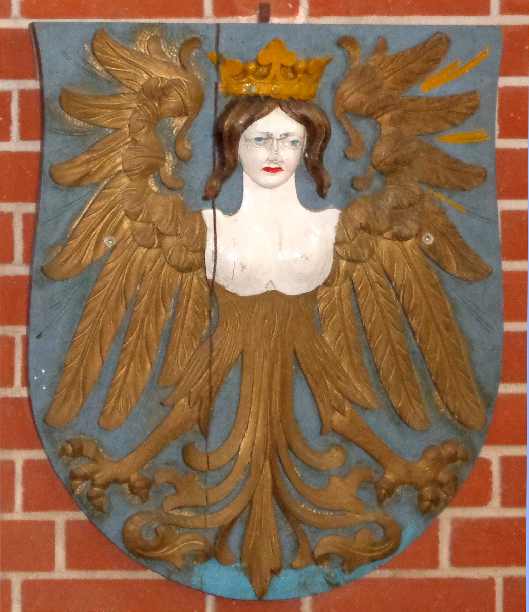 Schiffswappen des Kleinen Kreuzers Nürnberg (1906) in der Marineschule Mürwik